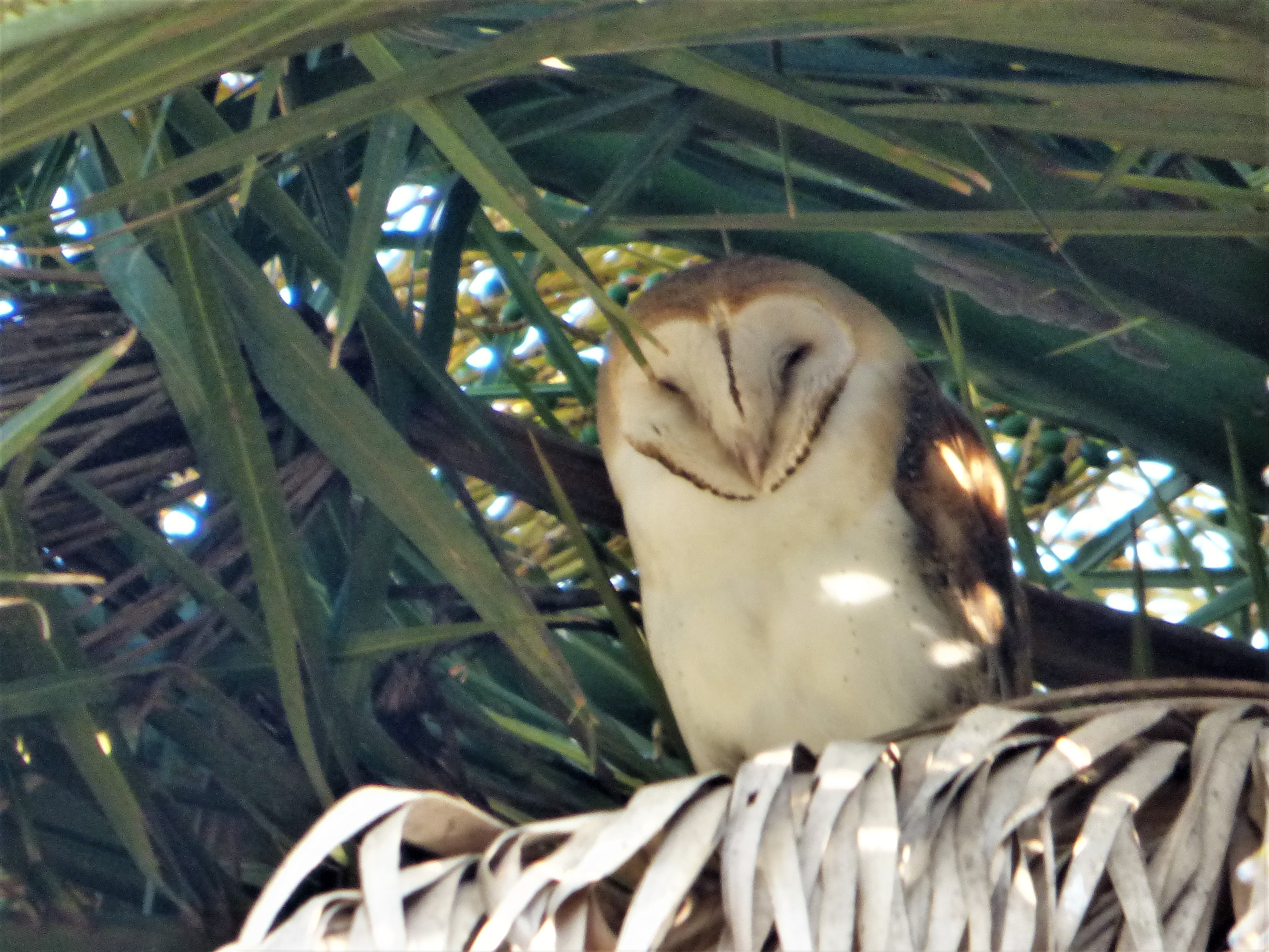 Lechuza de Campanario registrado en el Área Natural Protegida Florindo Donati, Argentina. Tyto furcata, Familia: Tytonidae Orden: Strigiformes Clase: Aves Filo: Chordata Reino: Animalia